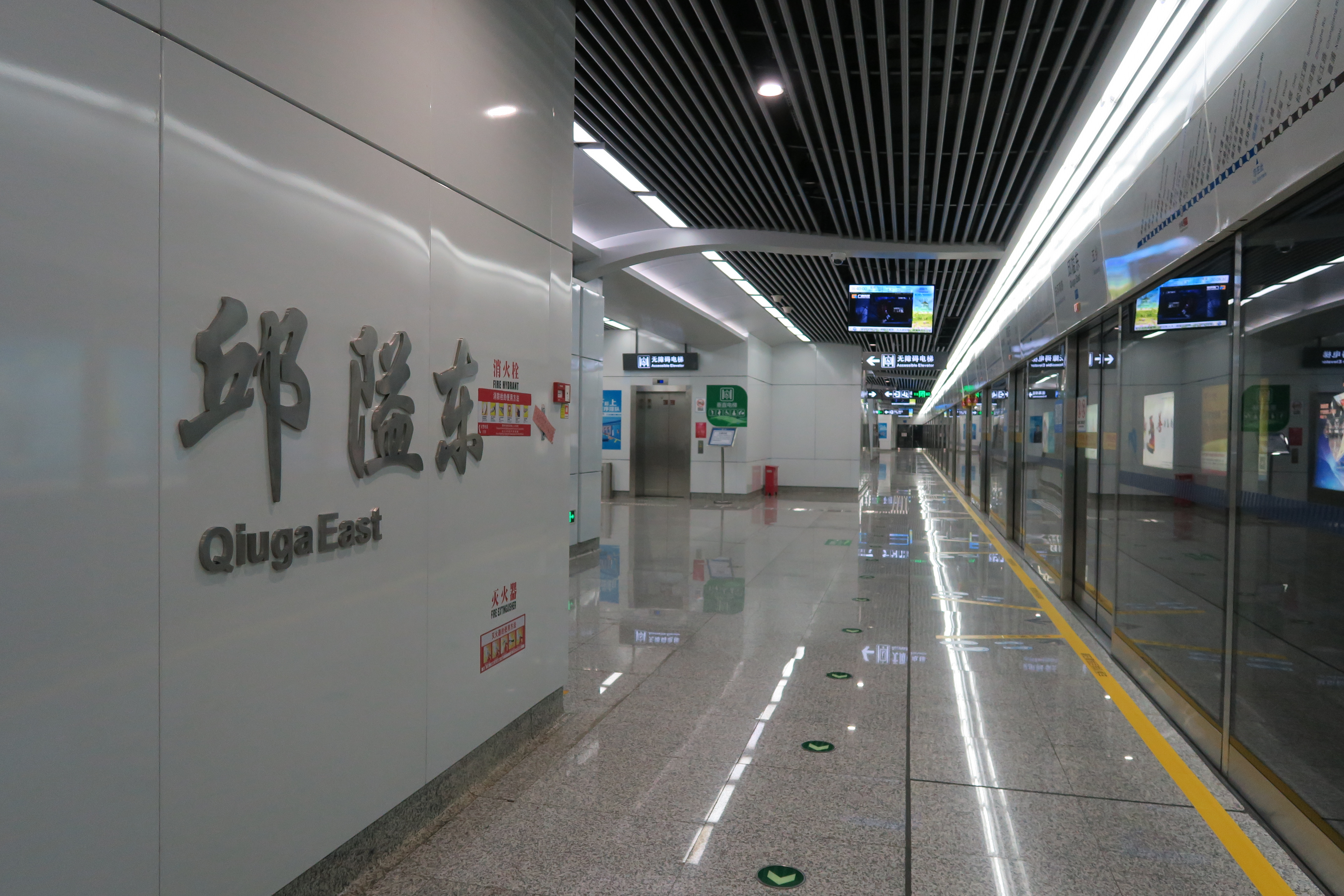 宁波轨道交通邱隘东站